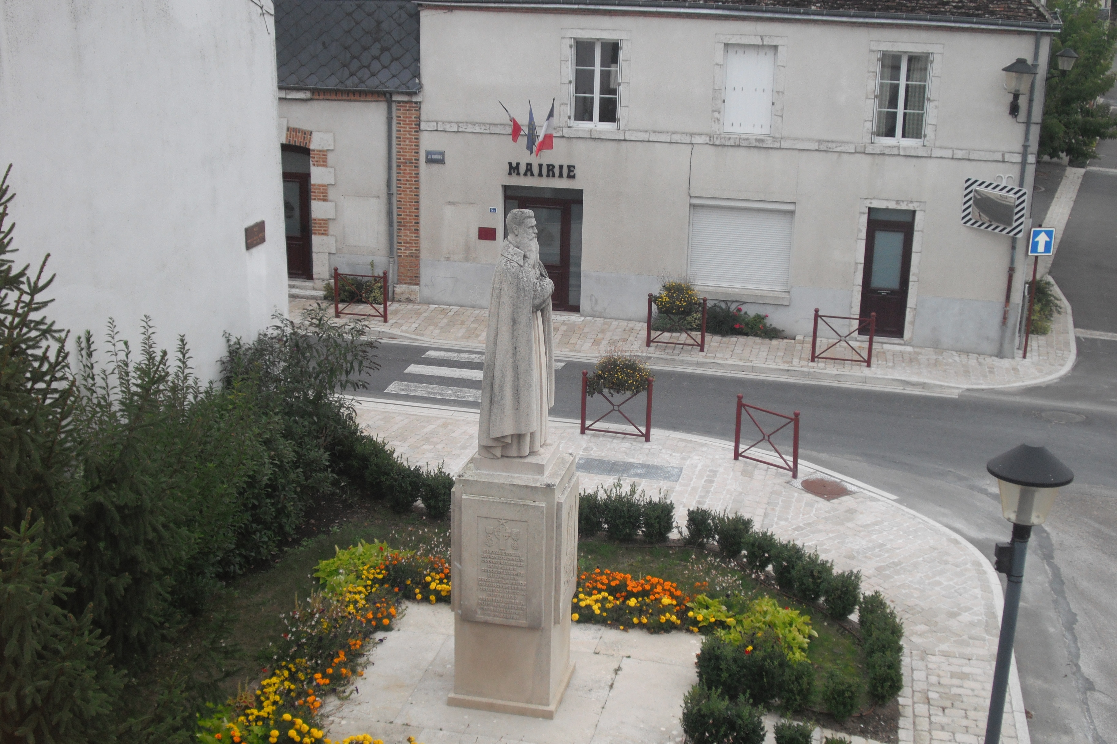 Statue et mairie de la Ferté St Cyr